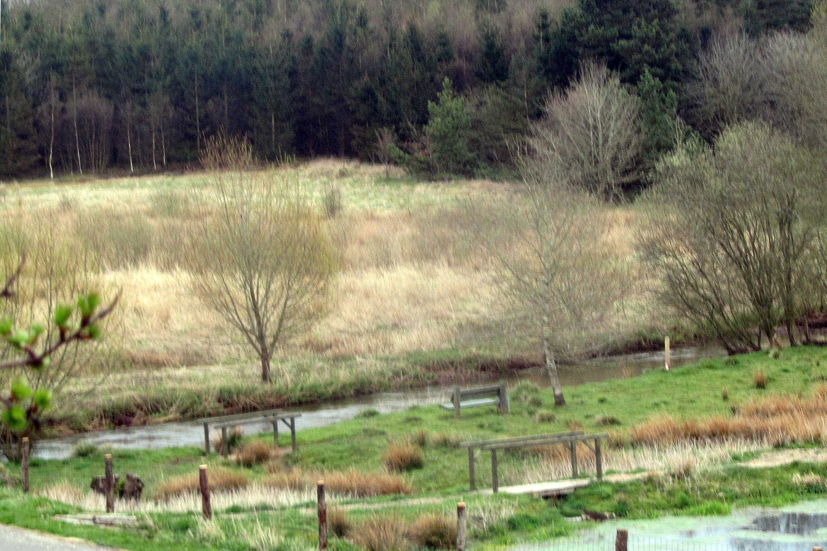 Rind Å neden for Arnborg Kirke